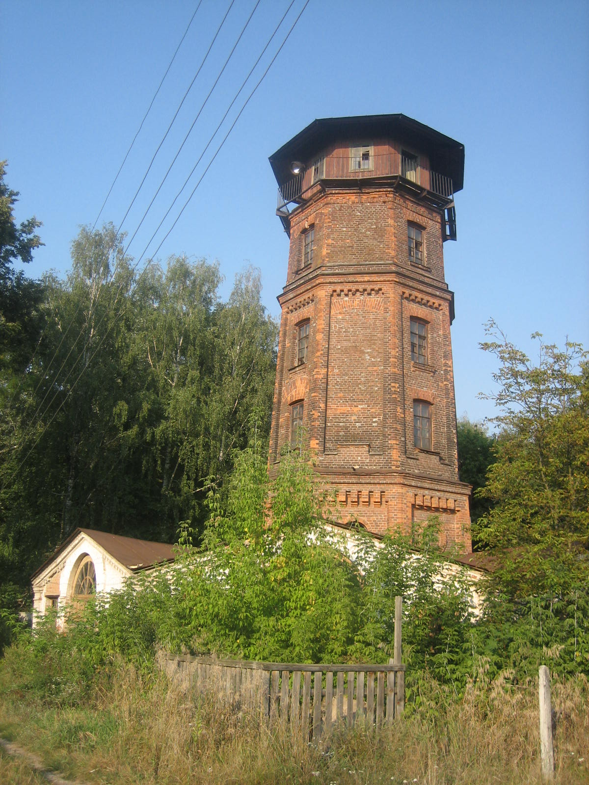 водонапірна башта садиби Терещенка в селі Шпитьки Києво-Святошинського району Київської області